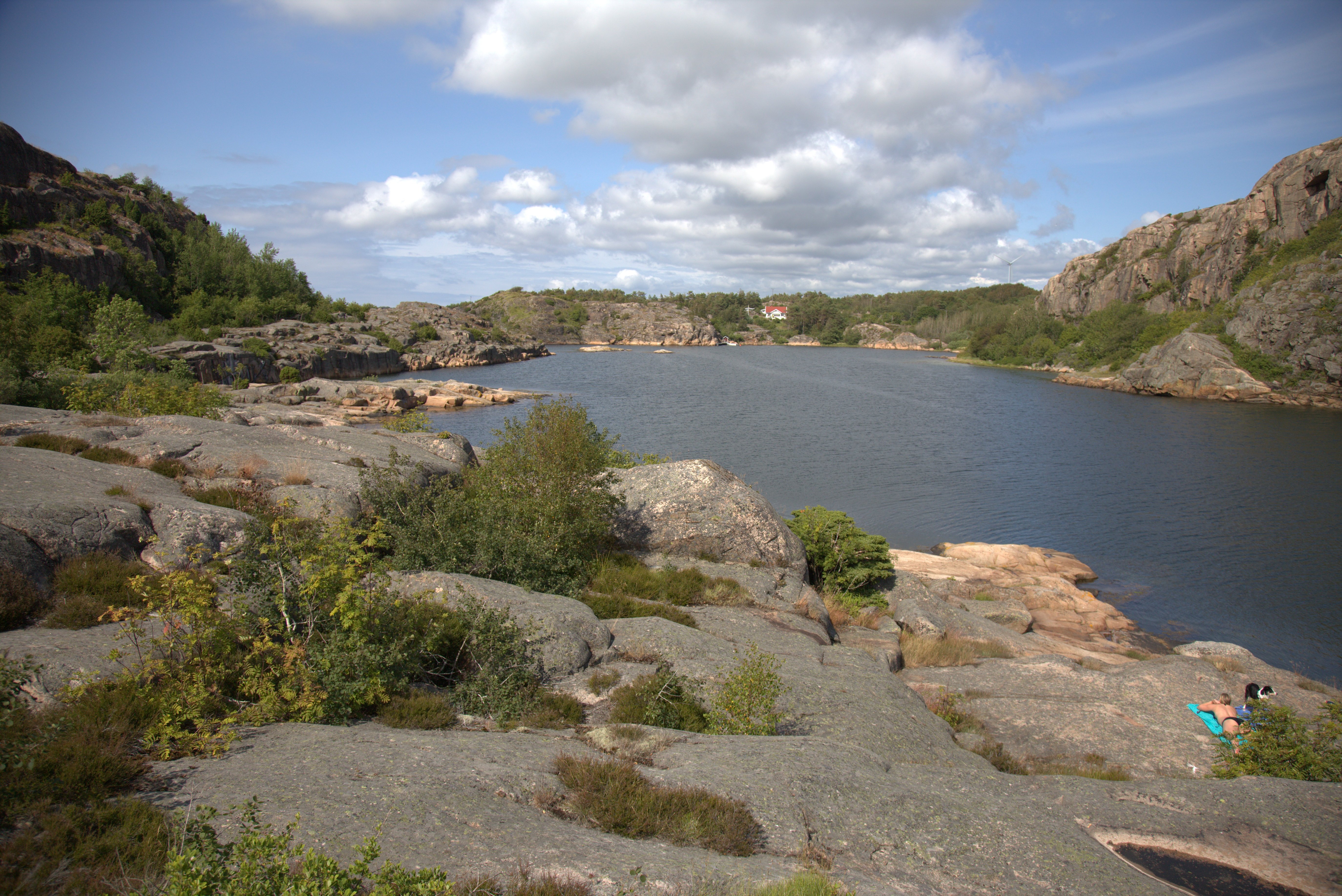 Klevekilen i Klevekilens naturreservat. Vy norrut mot pestkyrkogården.